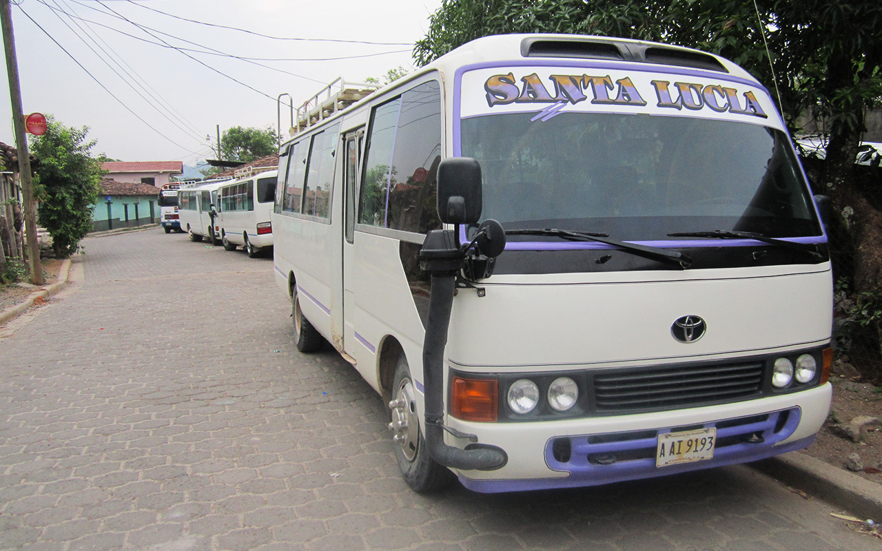 Transporte público